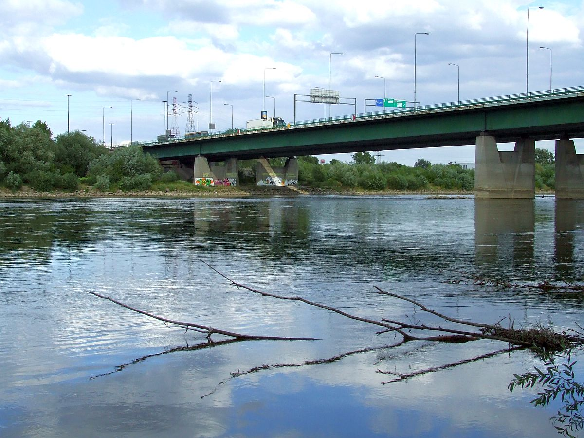 Most im. gen. Stefana Grota-Roweckiego, Warsaw